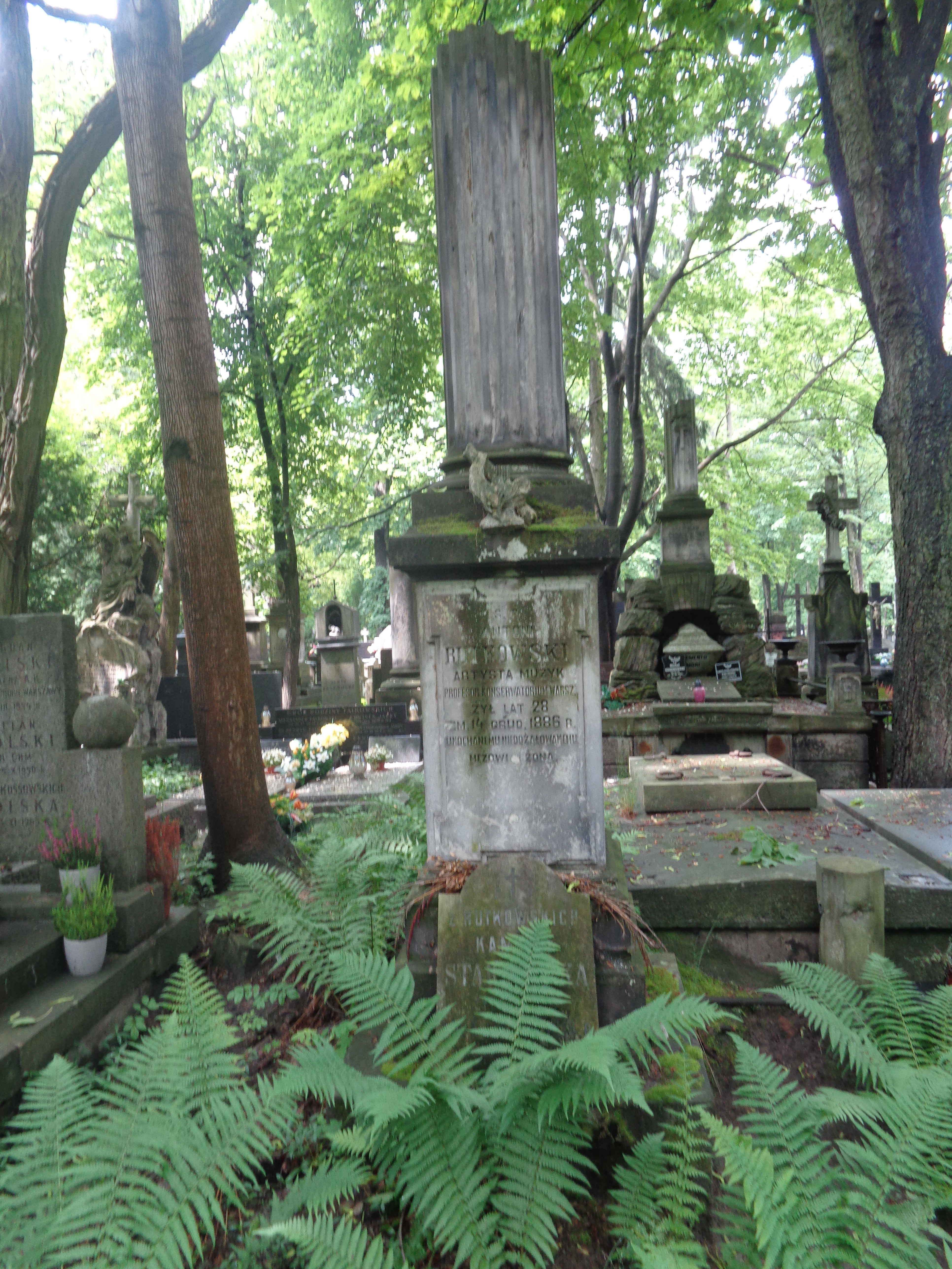 GróbAntoniego Rutkowskiego na Cmentarzu Powązkowskim